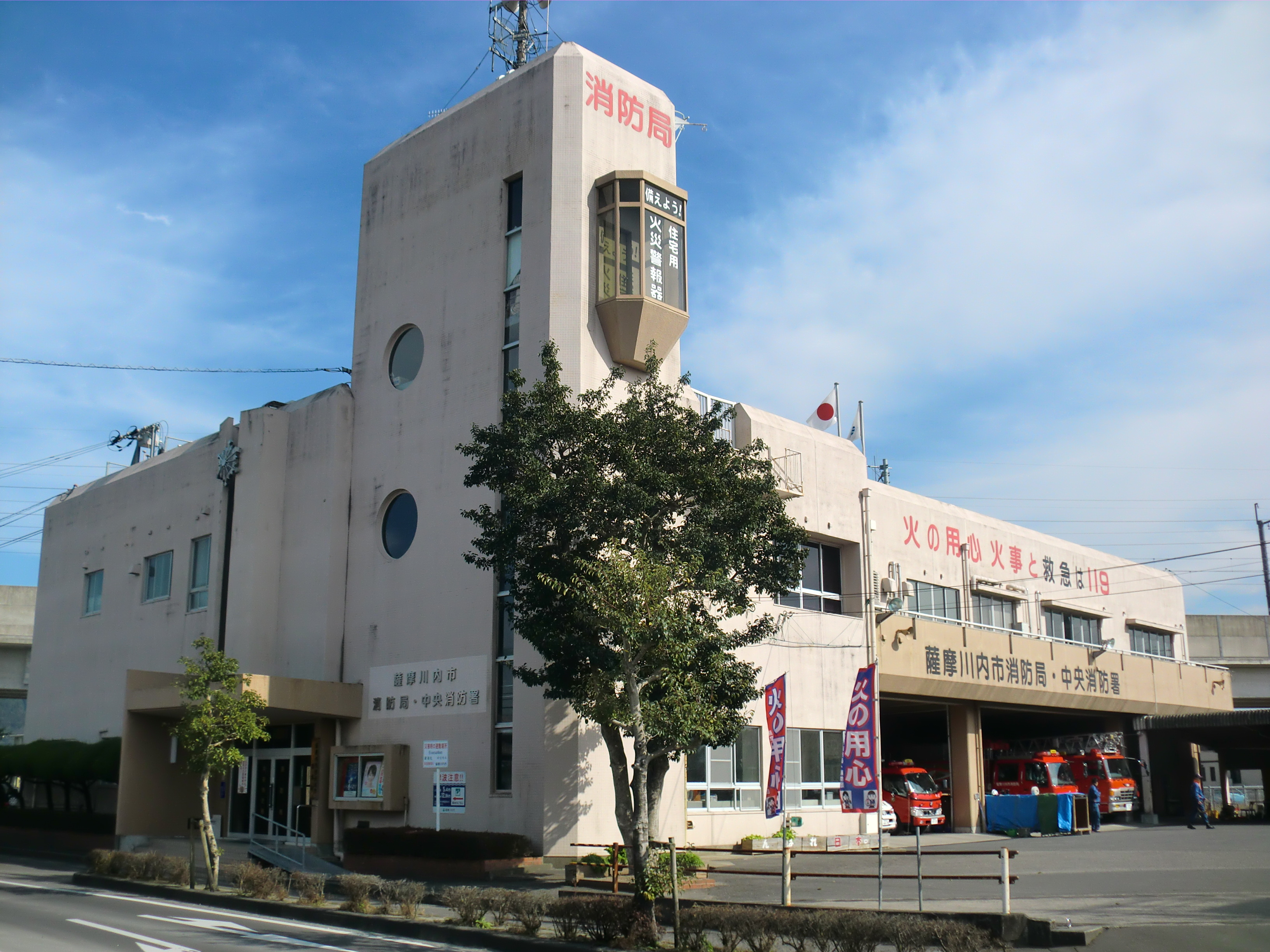 薩摩川内市にある薩摩川内市消防局（中央消防署と兼用）